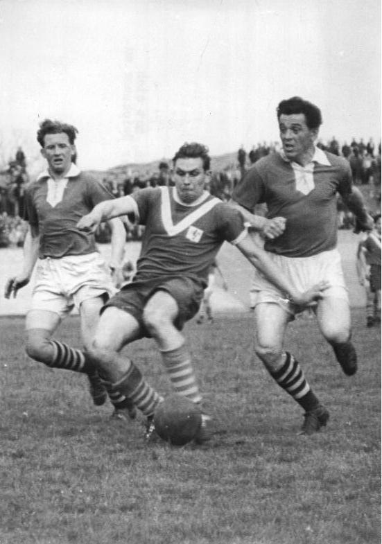 Zentralbild-Schlegel Fu-Th 17.5.1956 Turbine Erfurt bezwang Motor Zwickau 3:1 - Am Mittwoch, dem 16.5.1956 standen sich im Zwickauer George Dimitroff-Stadion die Mannschaften des SC Turbine Erfurt und des SC Motor Zwickau gegenüber. Die Turbine-Mannschaft konnte bei diesem Spiel mit 3:1 Toren die Oberhand behalten. UBz: Der Linksaußen von Turbine, Wallroth, hat sich durchgespielt und strebt auf das Tor der Zwickauer zu.